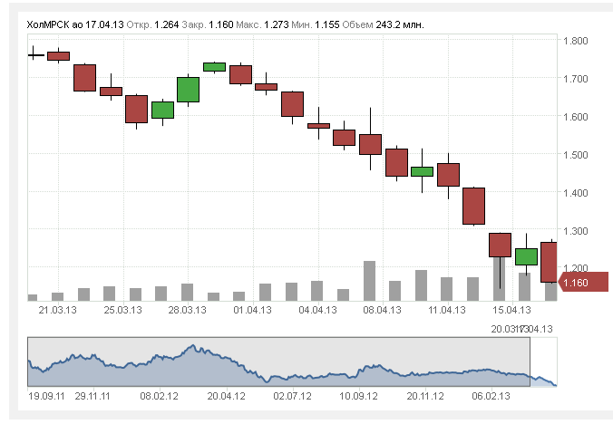 Изменение акций МРСК - Российские сети в период март-апрель 2013 года